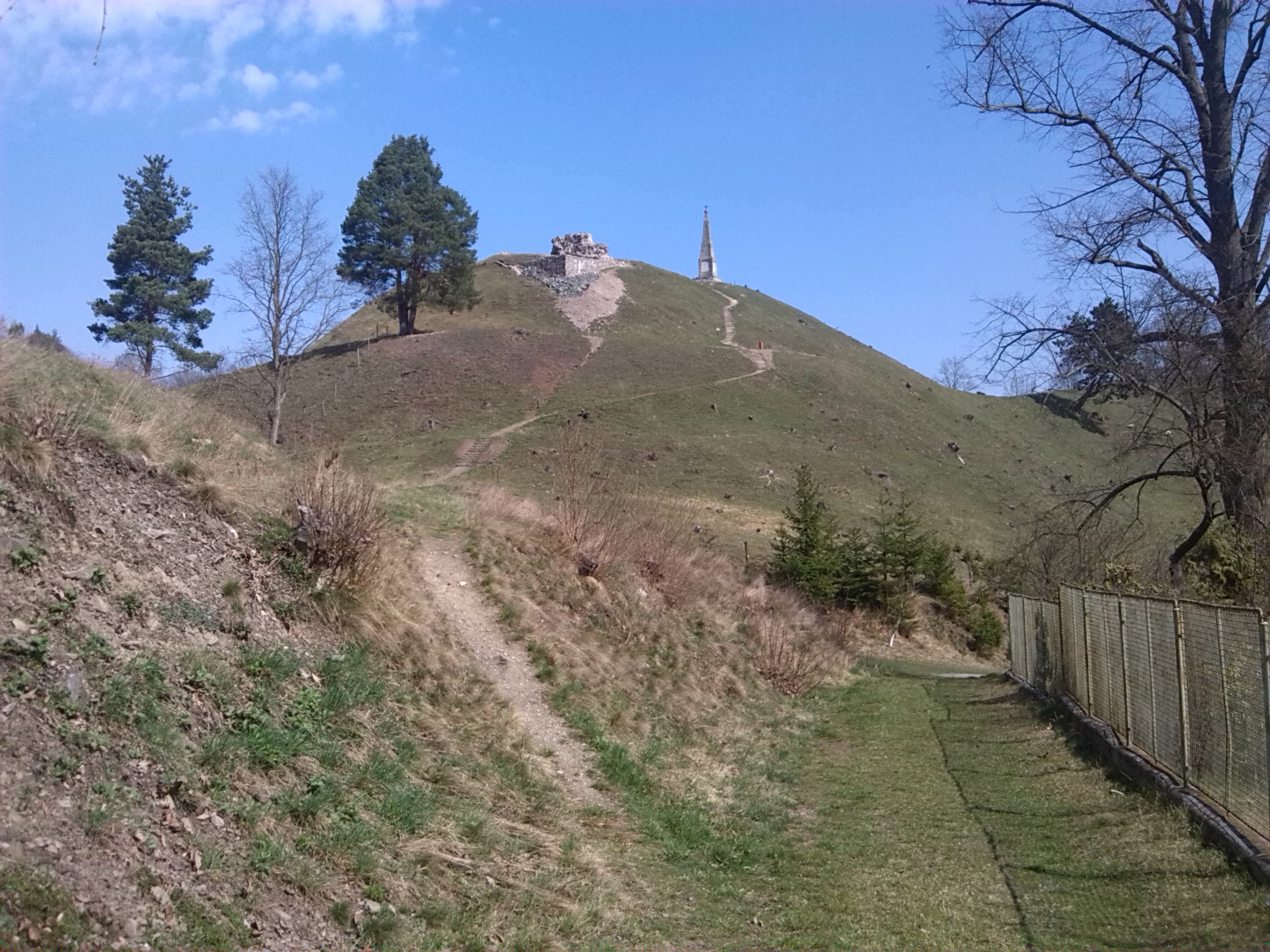 Hoštejn